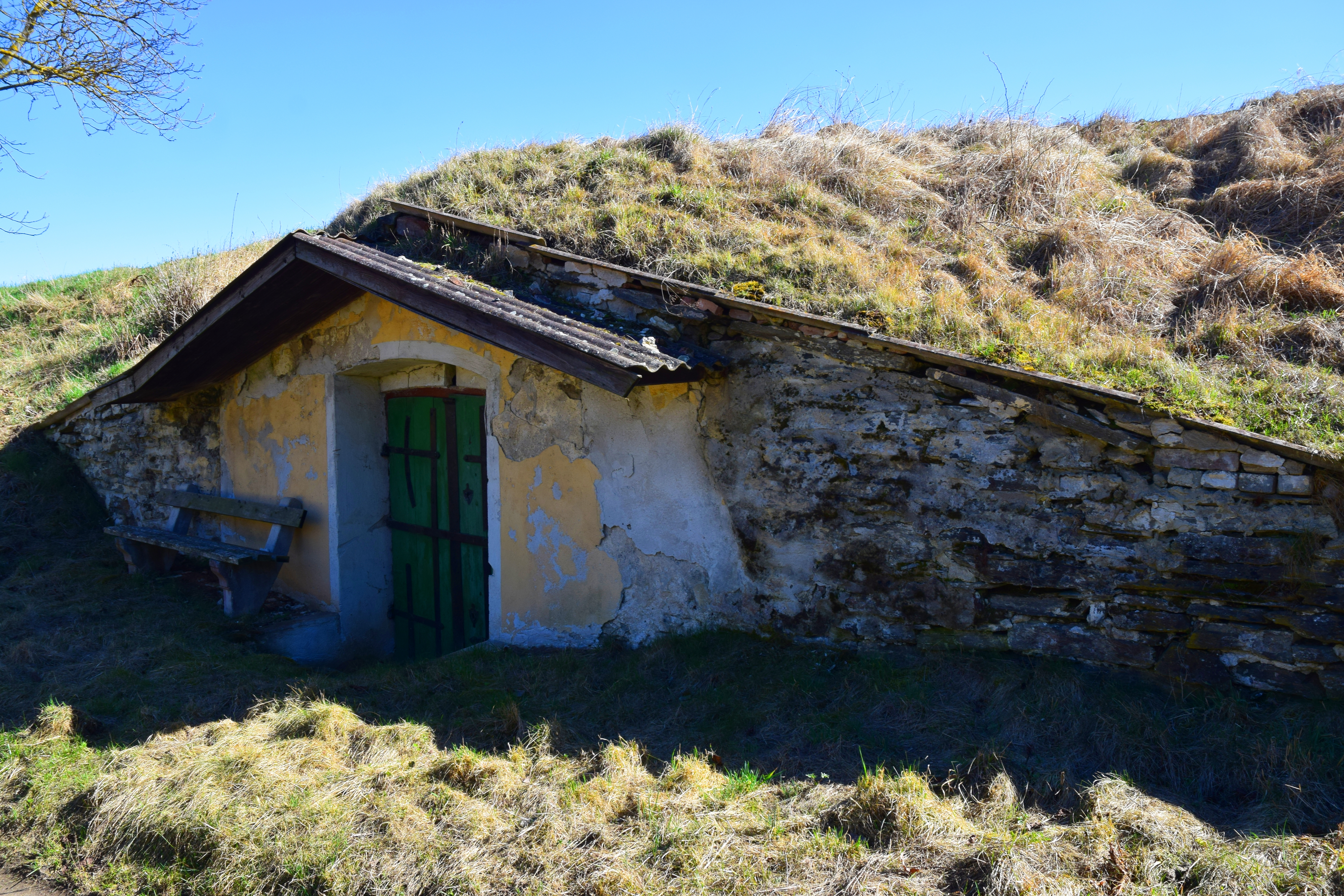 Objekt in der Kellergasse Feldweg Richtung Westen in der KG Mödring in Horn (Niederösterreich)